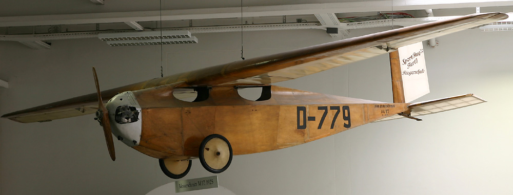 Messerschmitt M17 im Deutschen Museum, München